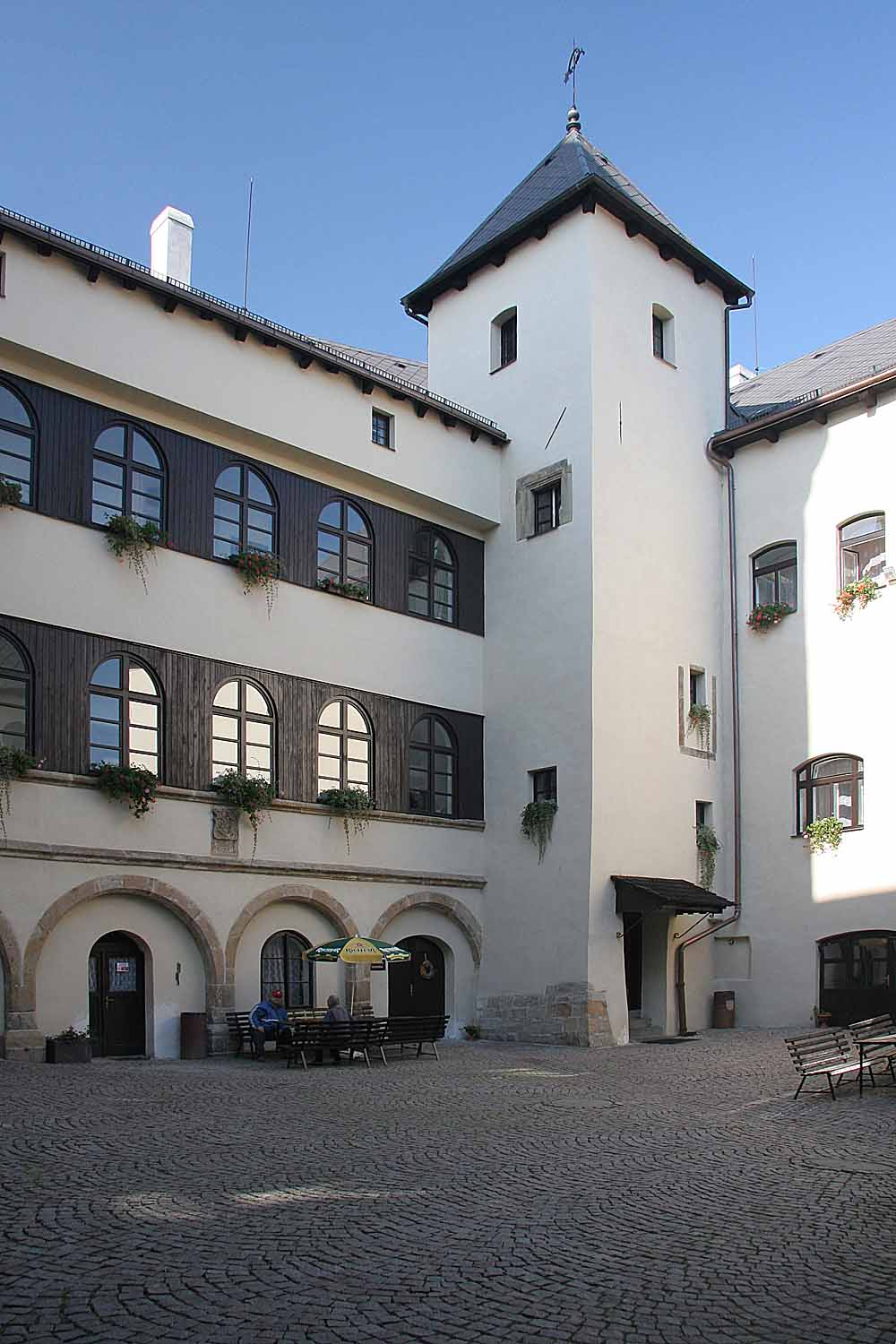 Nádvoří hradu Rychmburk v obci Předhradí, Chrudim district, Czech Republic autor: Prazak Date: 14. 9. 2006